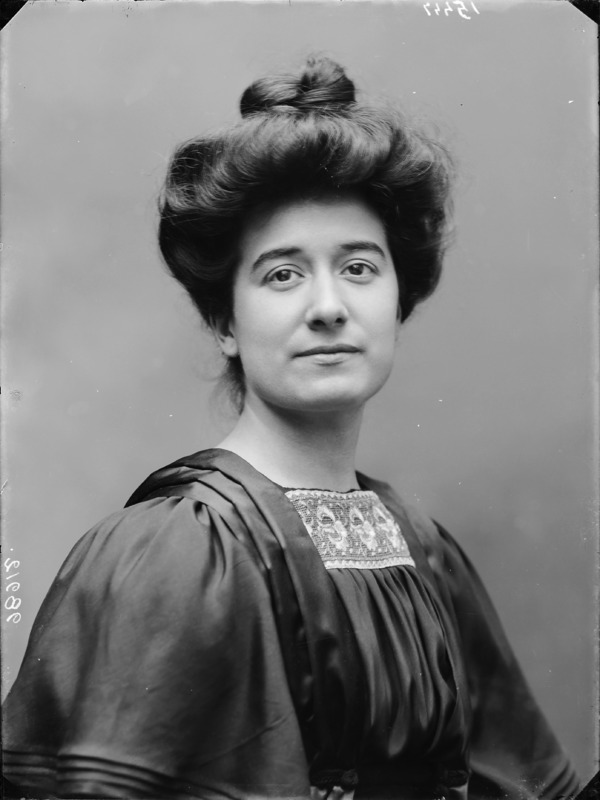 Ofelia Mazzoni fotografata da Mario Nunes Vais